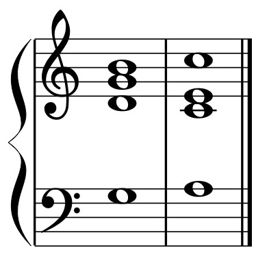 Příklad klamného závěru (rozvod dominanty do akordu na VI. stupnic v C dur)